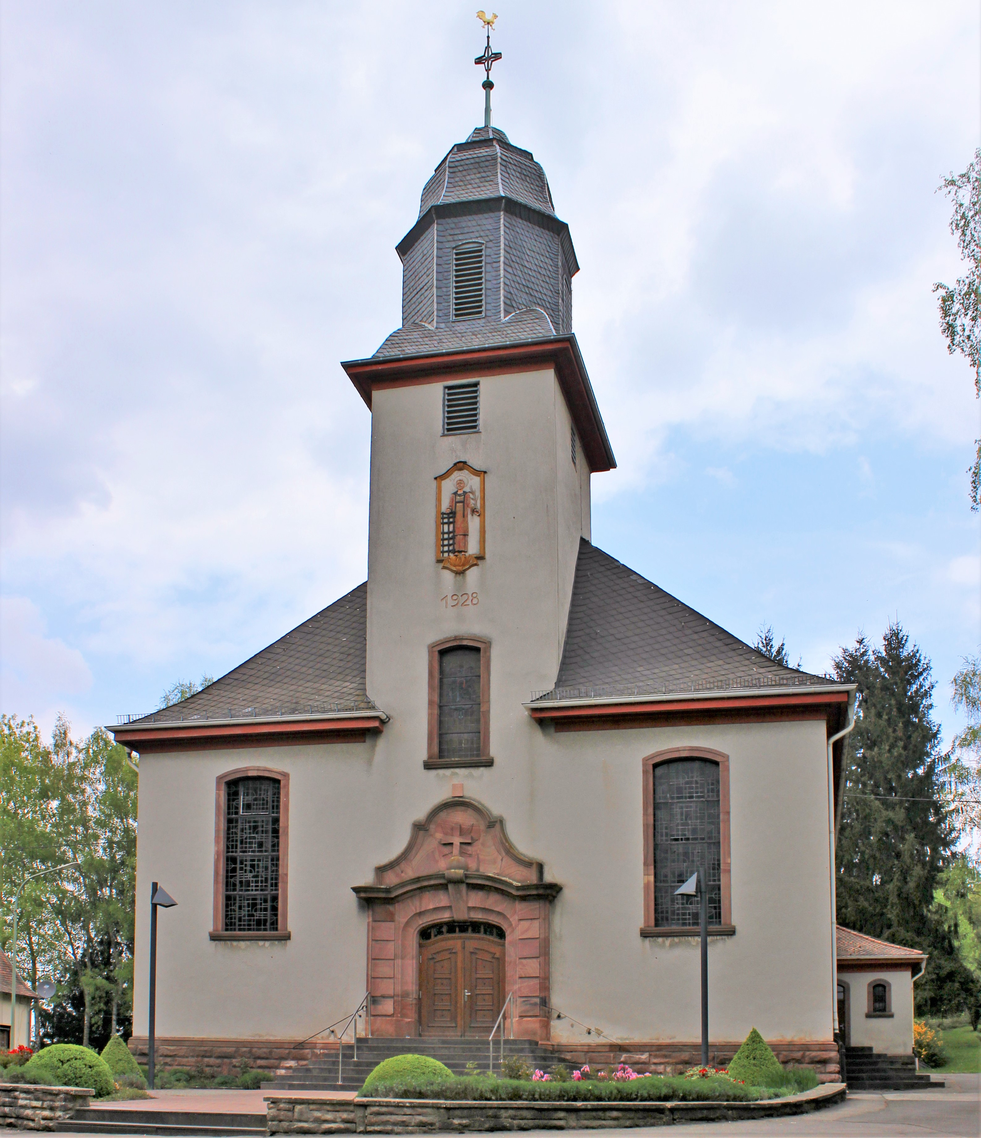 Die katholische Pfarrkirche St. Laurentius in Welschbach, einem Ortsteil der Gemeinde Illingen, Landkreis Neunkirchen, Saarland